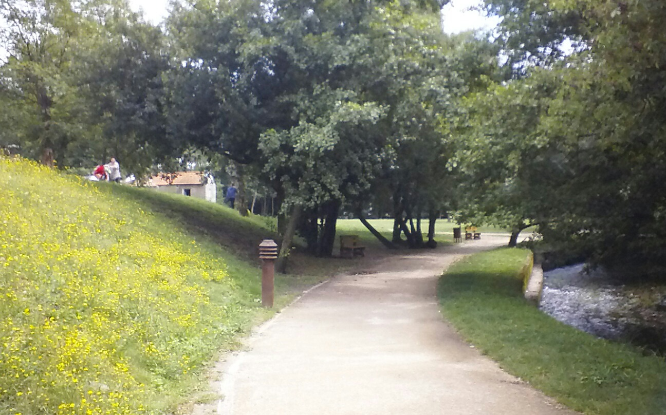 Paseo del parque del río Gafos en Pontevedra capital